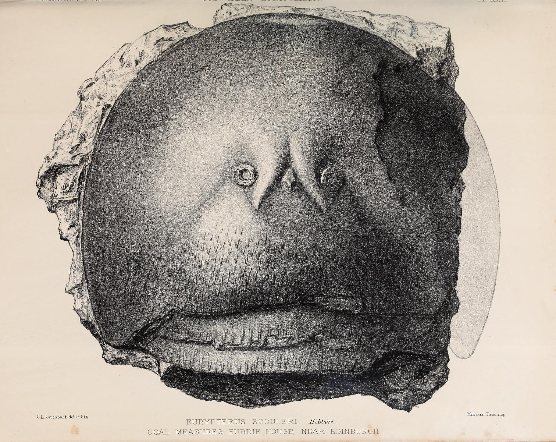 p 8 P . p P, l-H tf P w CO p P P o o p o CO 1 — 1 m ffi P p £ pq P E-. CO P P CO p £ p ^ d a